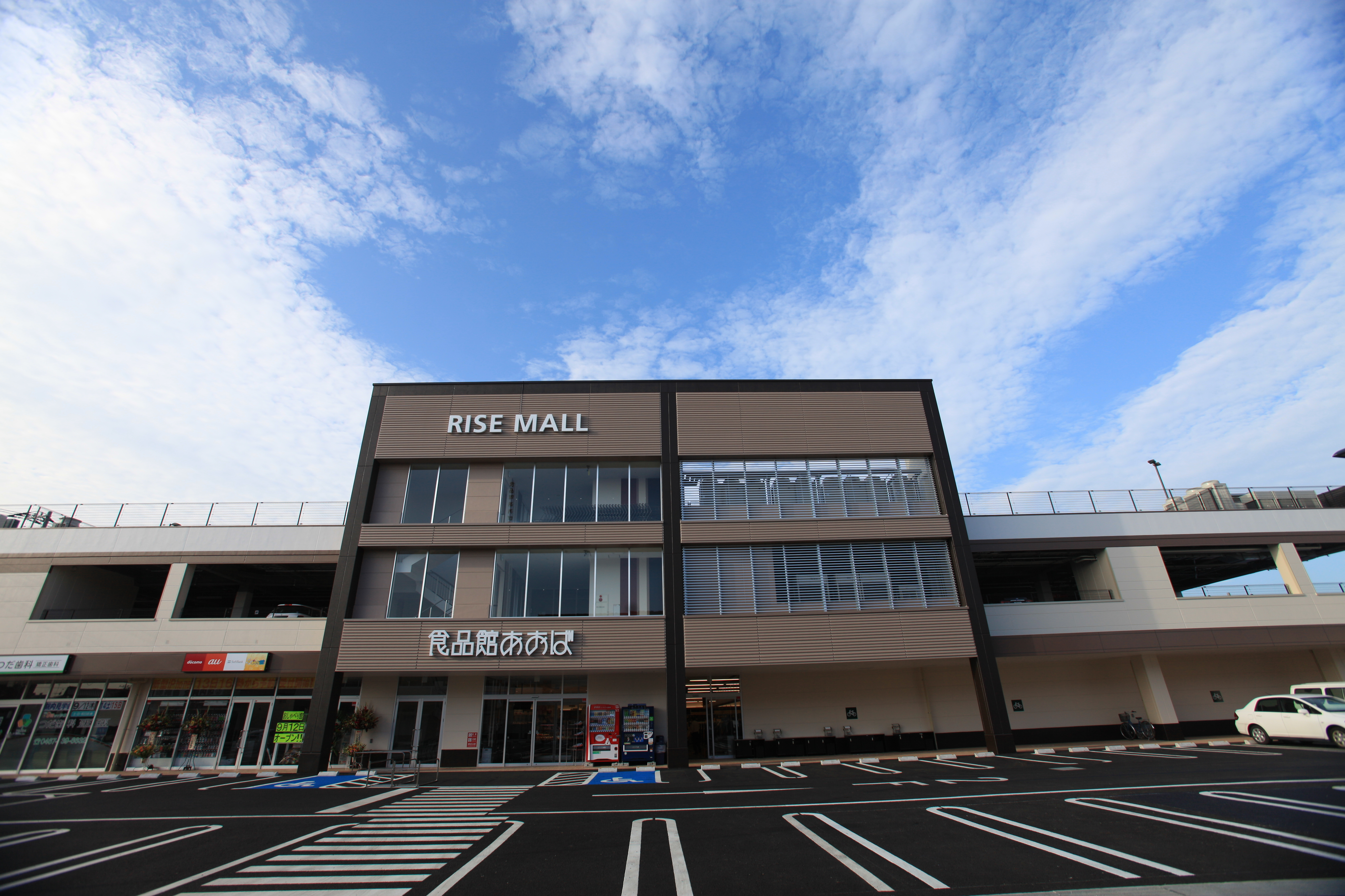 RISE MALL綾瀬